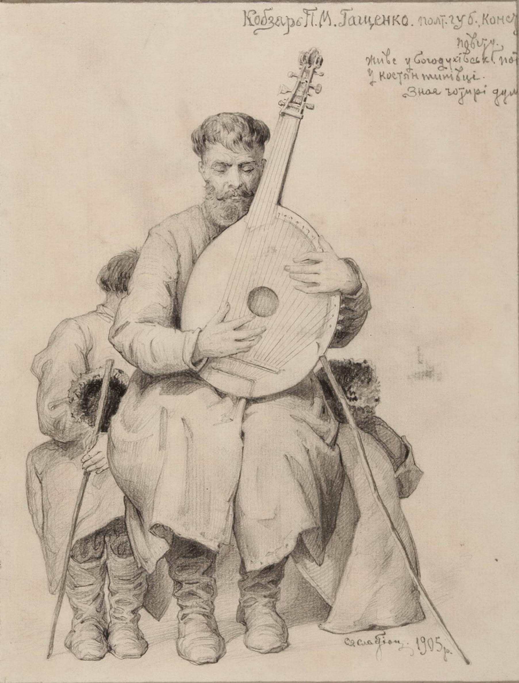 Ukrainian Kobzar P. Haschenko